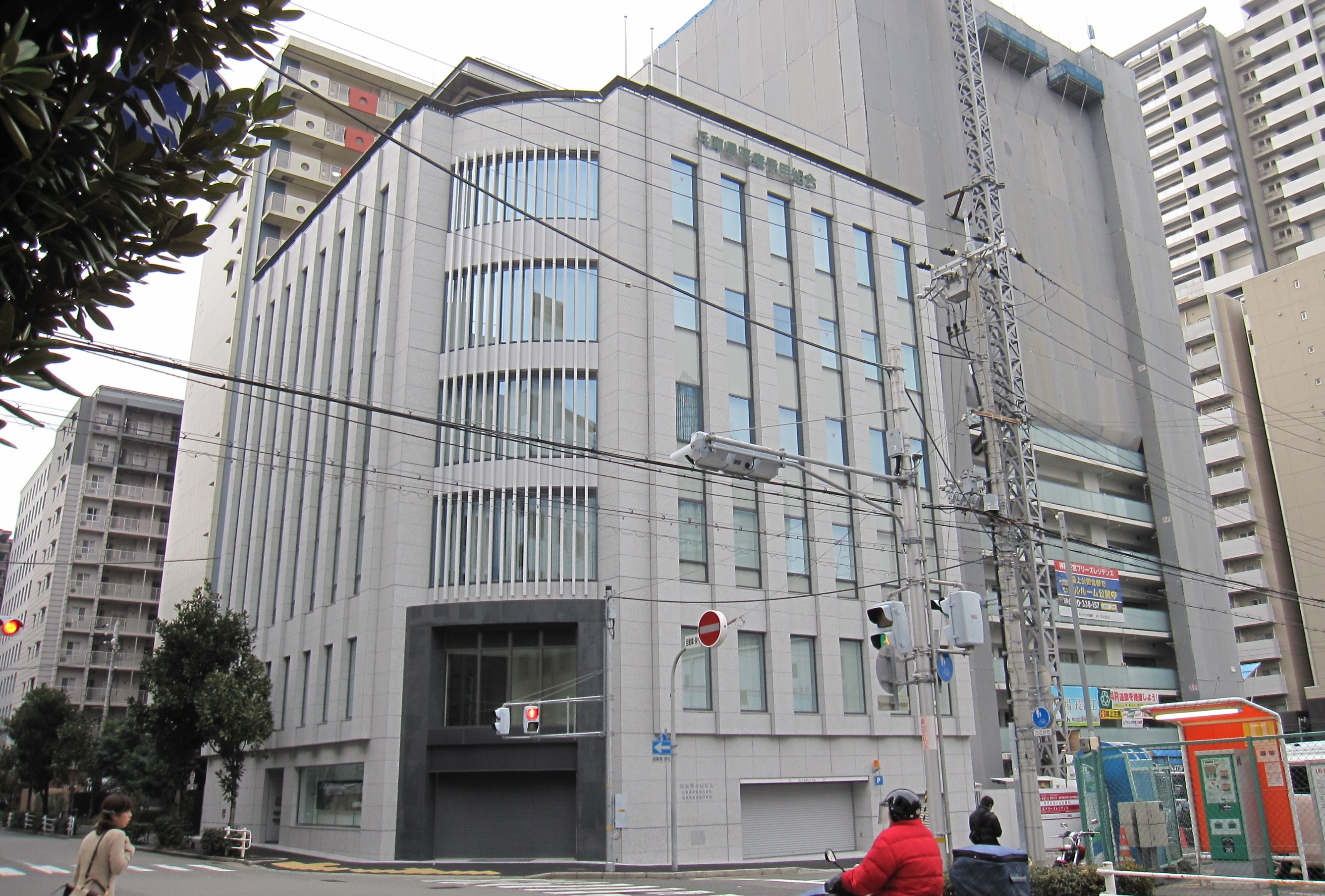 兵庫県医療信用組合本店